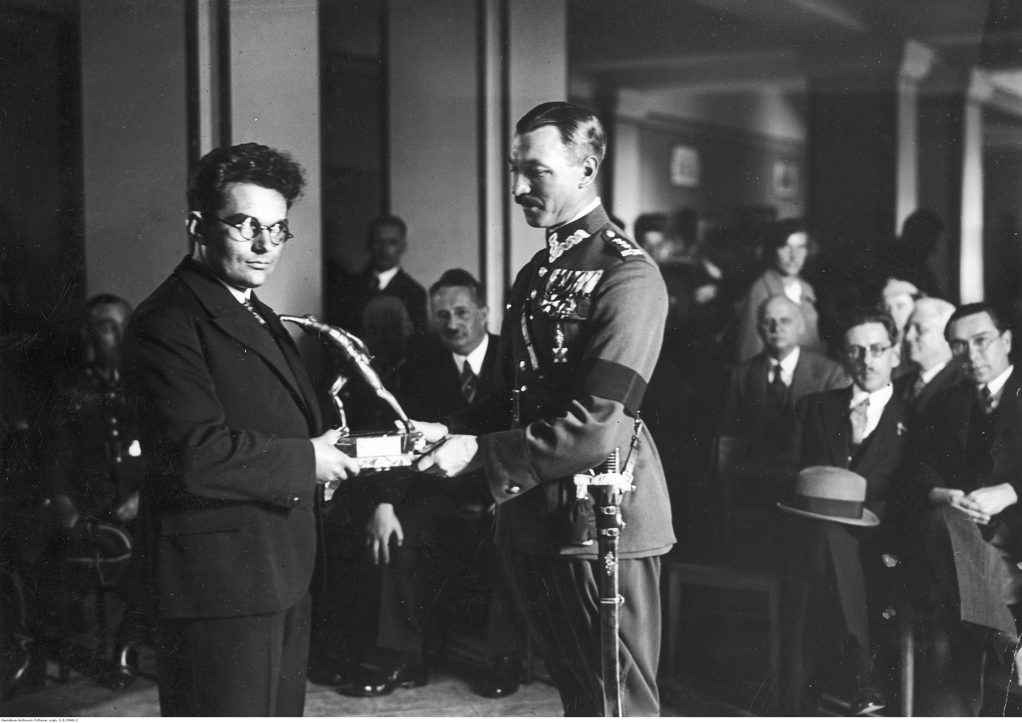 Zawody Strzeleckie, Łucznicze i Myśliwskie w Poznaniu; czerwiec 1935. Pułkownik Franciszek Alter wręcza nagrodę uczestnikowi zawodów. Na dalszym planie widoczni m.in.: prezes Izby Skarbowej Ferdynand Świtalski (z prawej), dyrektor Poczt i Telegrafów Alfred Wallner, naczelnik Józef Szczepanowski. Koncern Ilustrowany Kurier Codzienny - Archiwum Ilustracji. Sygnatura: 1-S-2948-2